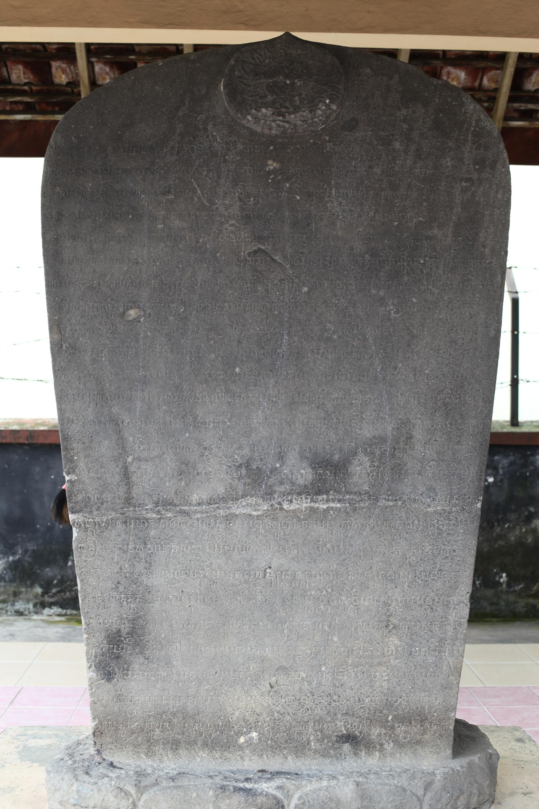 Prasasti Munggut (Munggut Inscription)